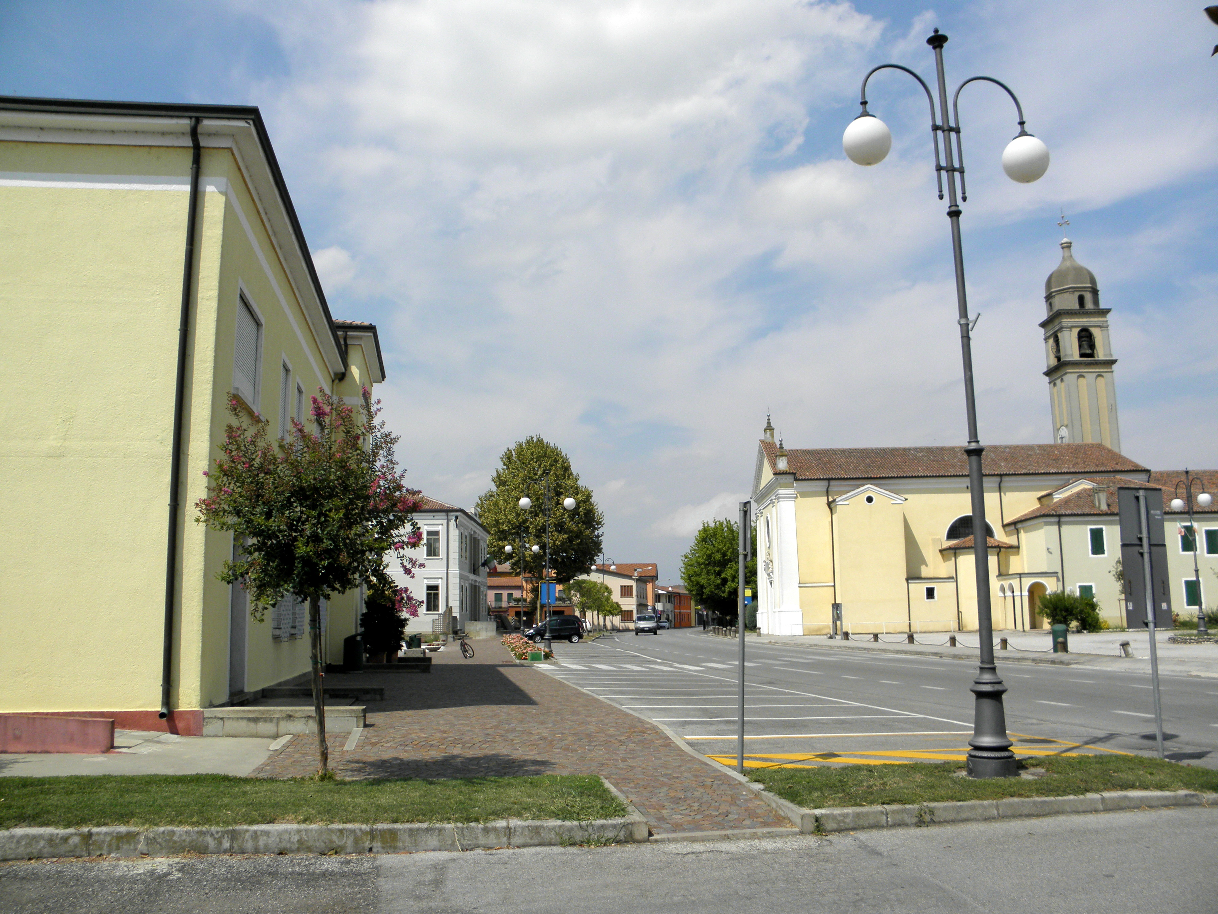 Granze, Via della Libertà, la principale via che attraversa l'abitato. Si nota sulla sinistra l'edificio che ospita il Municipio, sulla destra la chiesa parrocchiale di Santa Cristina.